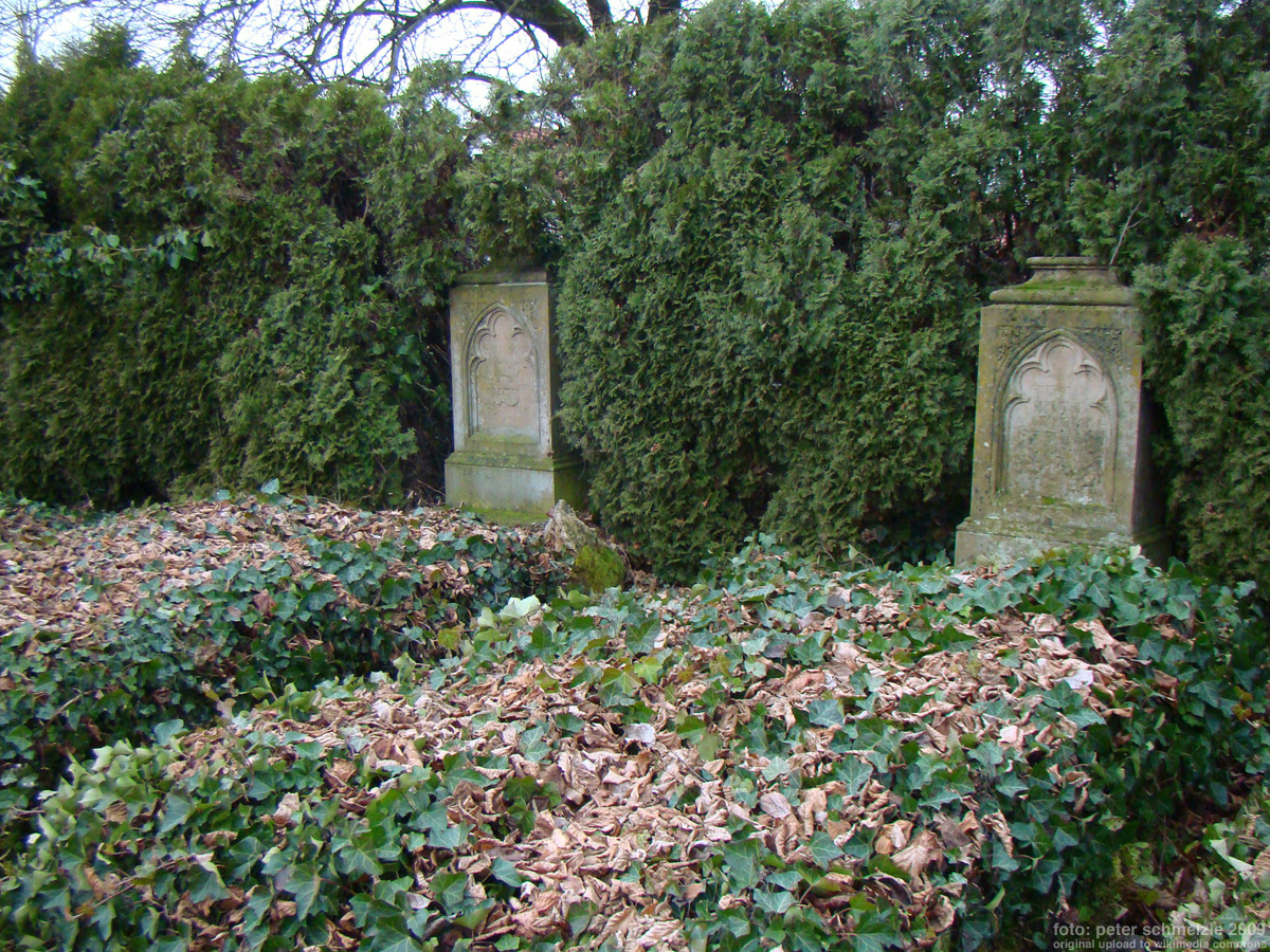 Grabmal für Freiherr Moritz-Ludwig von Gemmingen-Guttenberg (1817-1883) und Gattin Helene von Gemmingen-Guttenberg geb. von Rauch (1834-1908) auf dem Friedhof in Bad Rappenau-Bonfeld